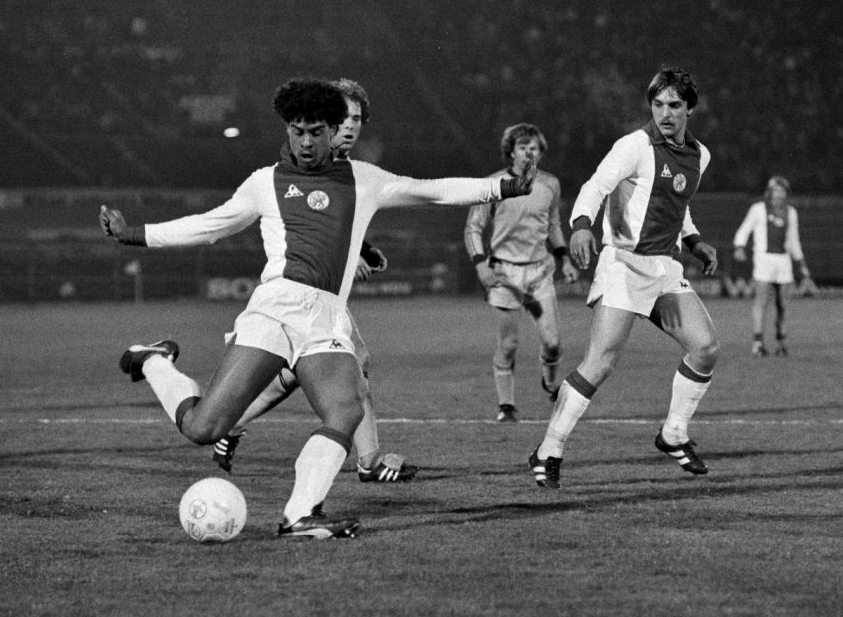 Europacup I Ajax tegen Bayern Munchen, Ajax-speler Rijkaard gaat hier tweede doelpunt scoren, rechts Edo Ophof